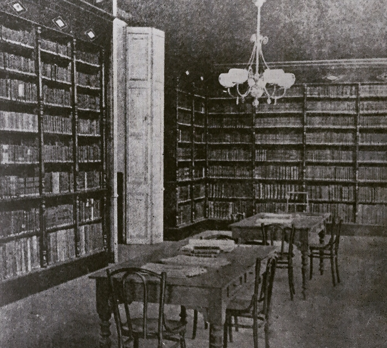 Salones Sur Oeste de la antigua sede de la Biblioteca Nacional de Venezuela.